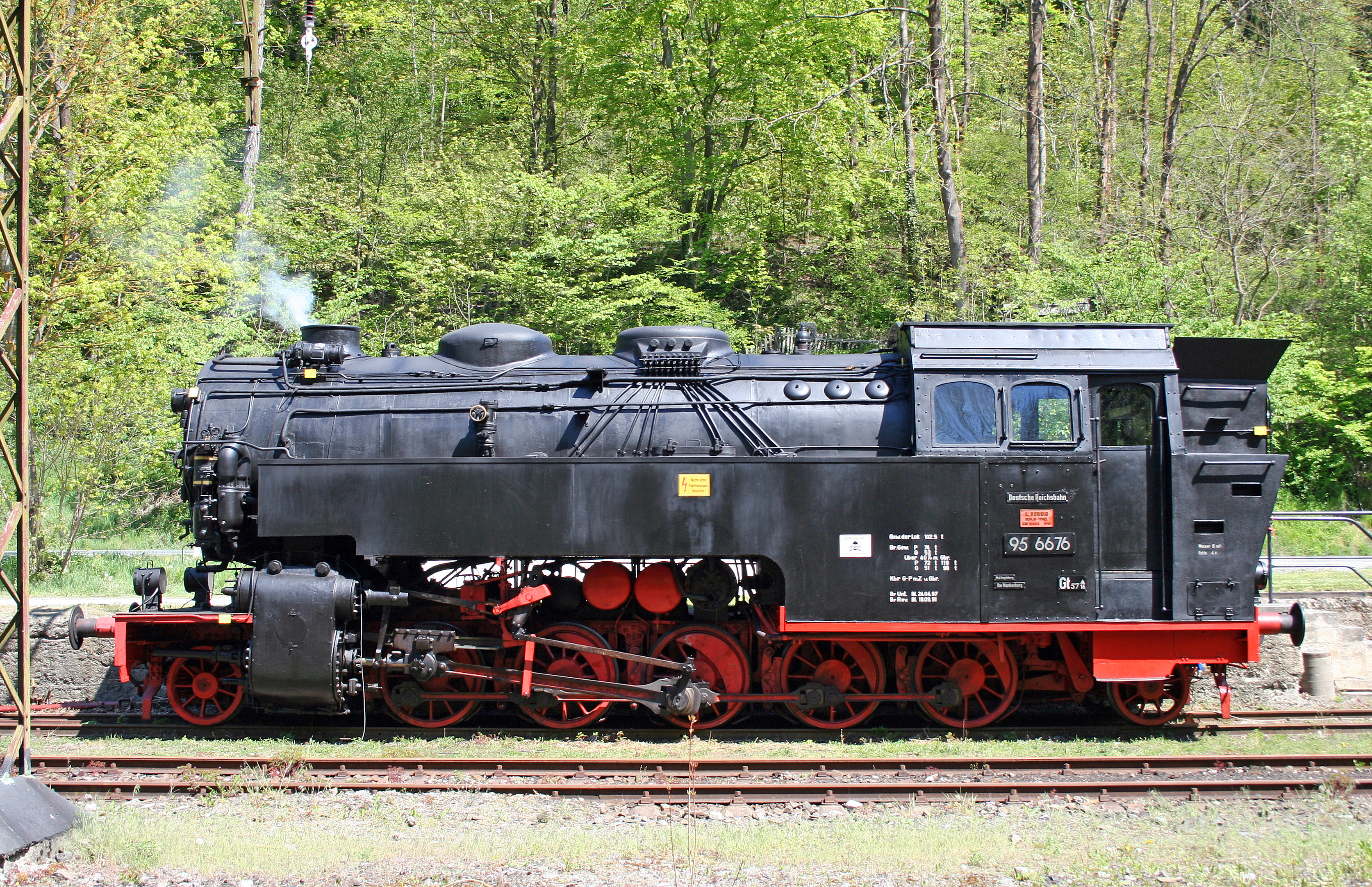 Dampflokomotive 95 6676 ex Mammut in Rübeland